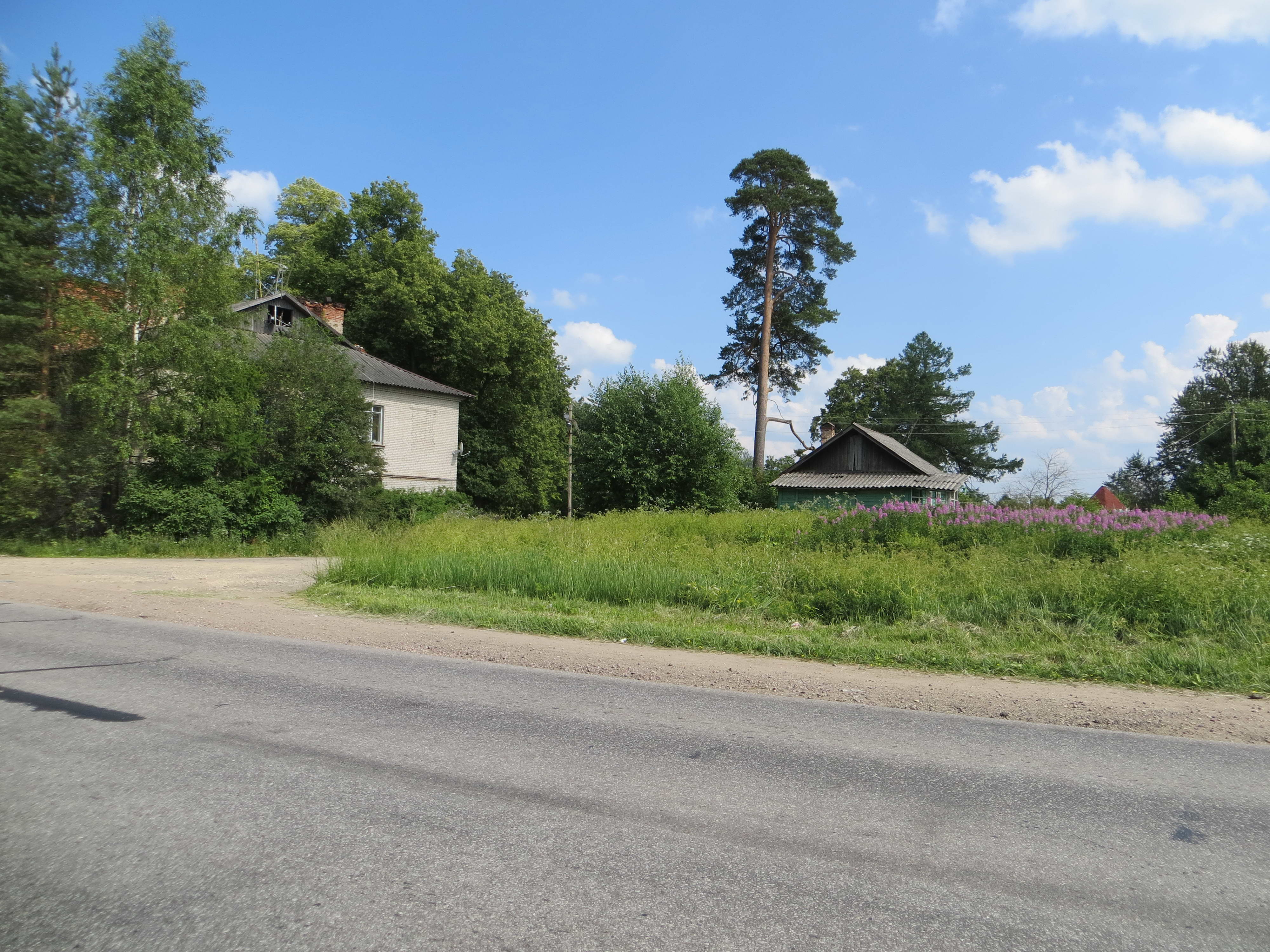 Деревня Войсковицы.